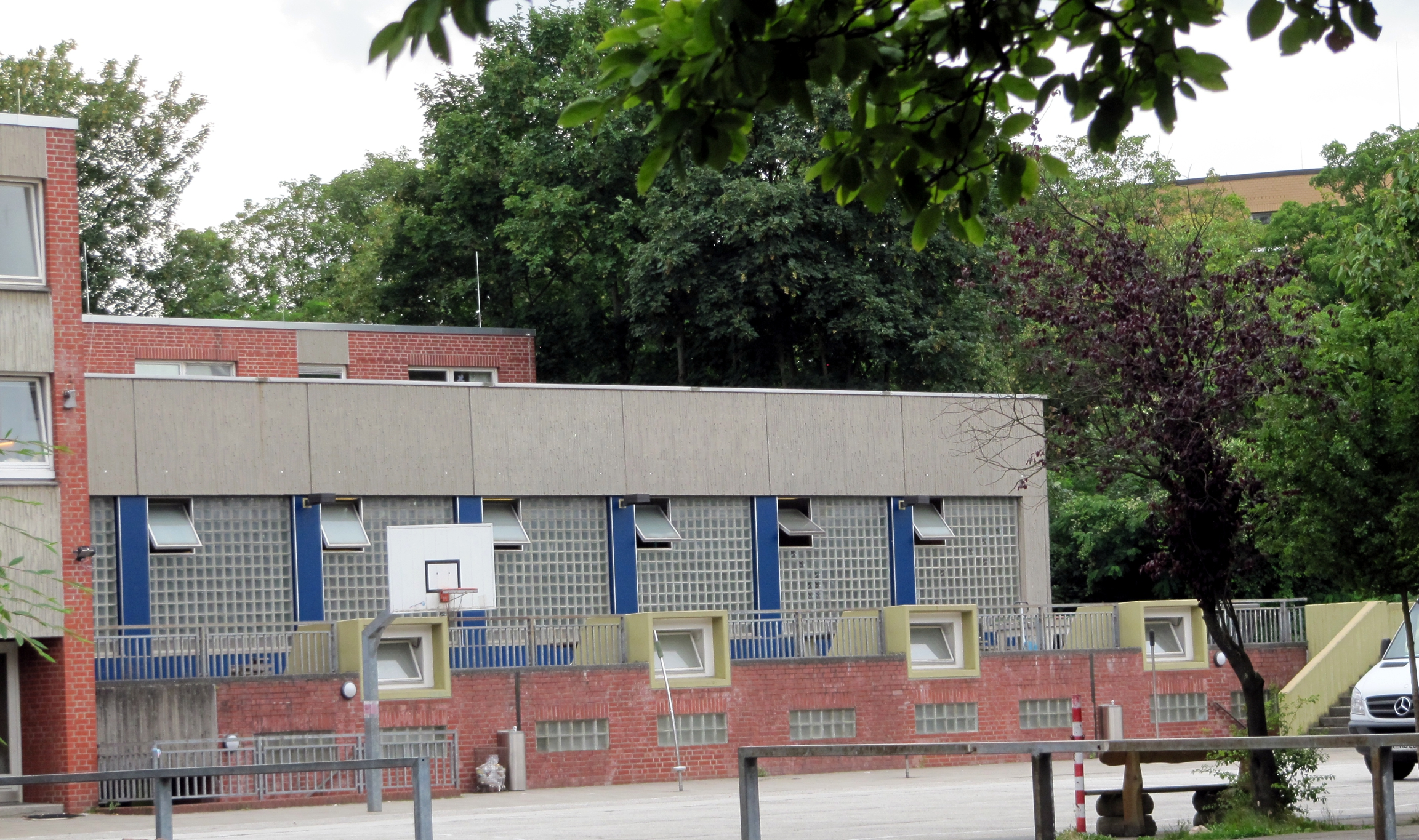 Turnhalle